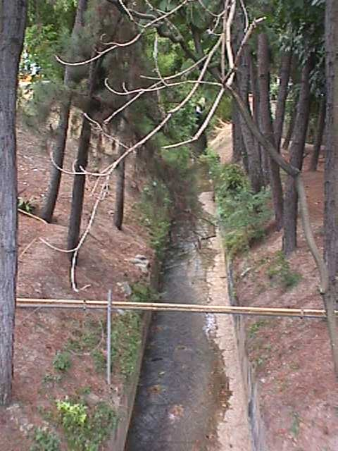 Quebrada Sorocaima es un pequeño curso de agua del sector mirandino de ciudad de Caracas en Venezuela sus aguas trascurren por los Municipios Baruta del estado Miranda.